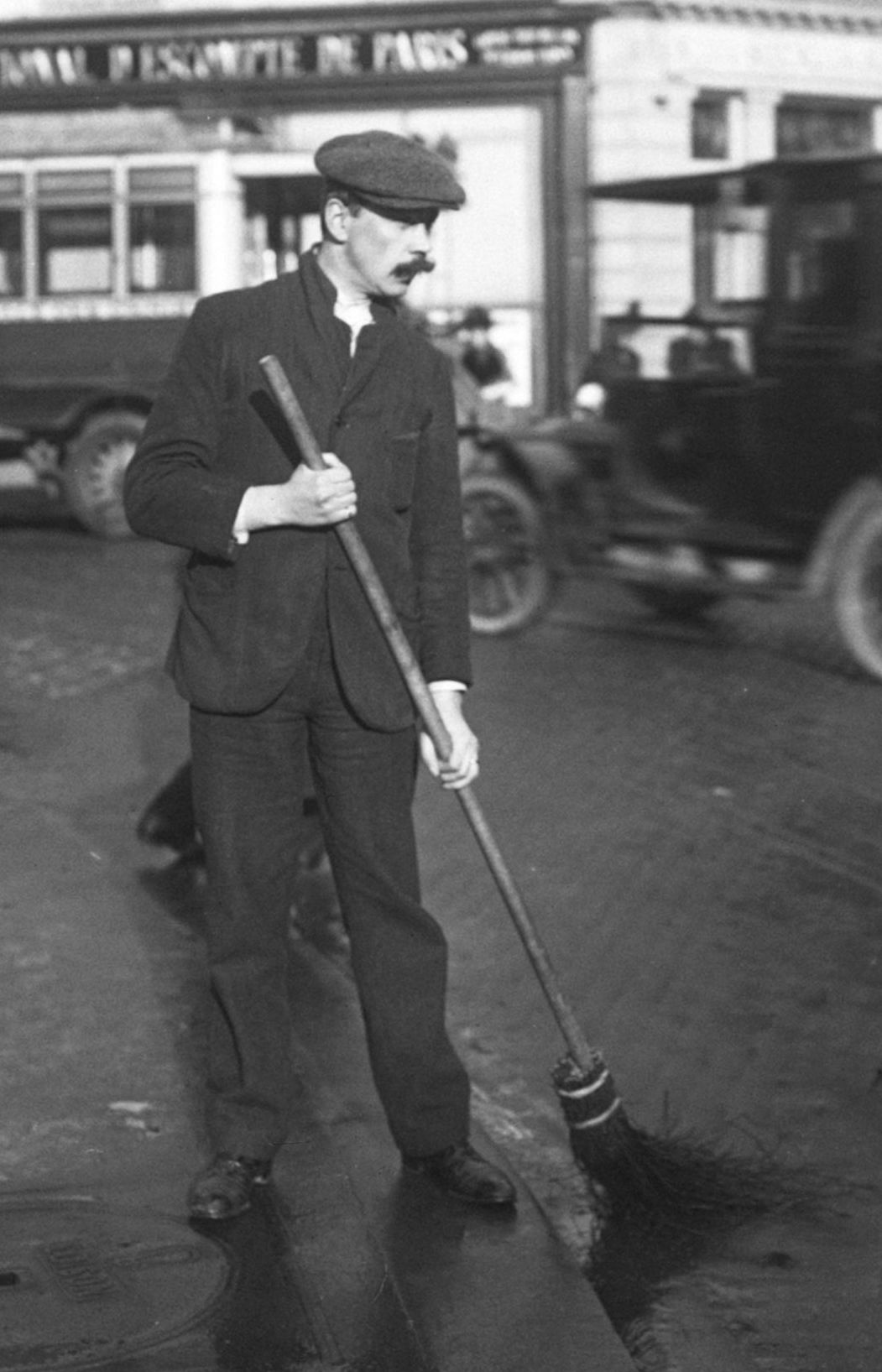 Balayeur nettoyant un caniveau à Paris en 1914